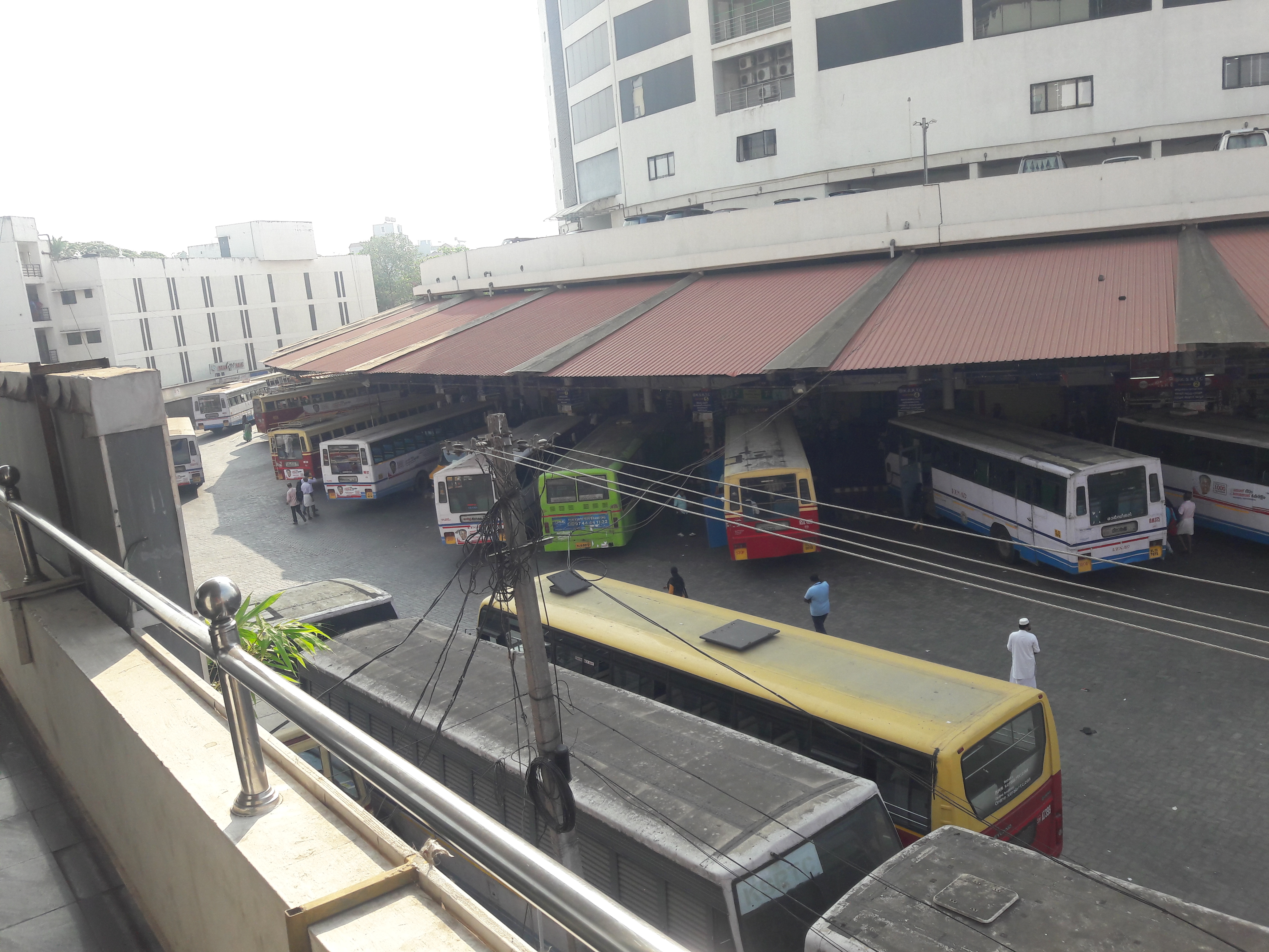 കേരള സ്റ്റേറ്റ് റോഡ് ട്രാൻസ്പോർട്ട് കോർപ്പറേഷൻ തിരുവനന്തപുരം.